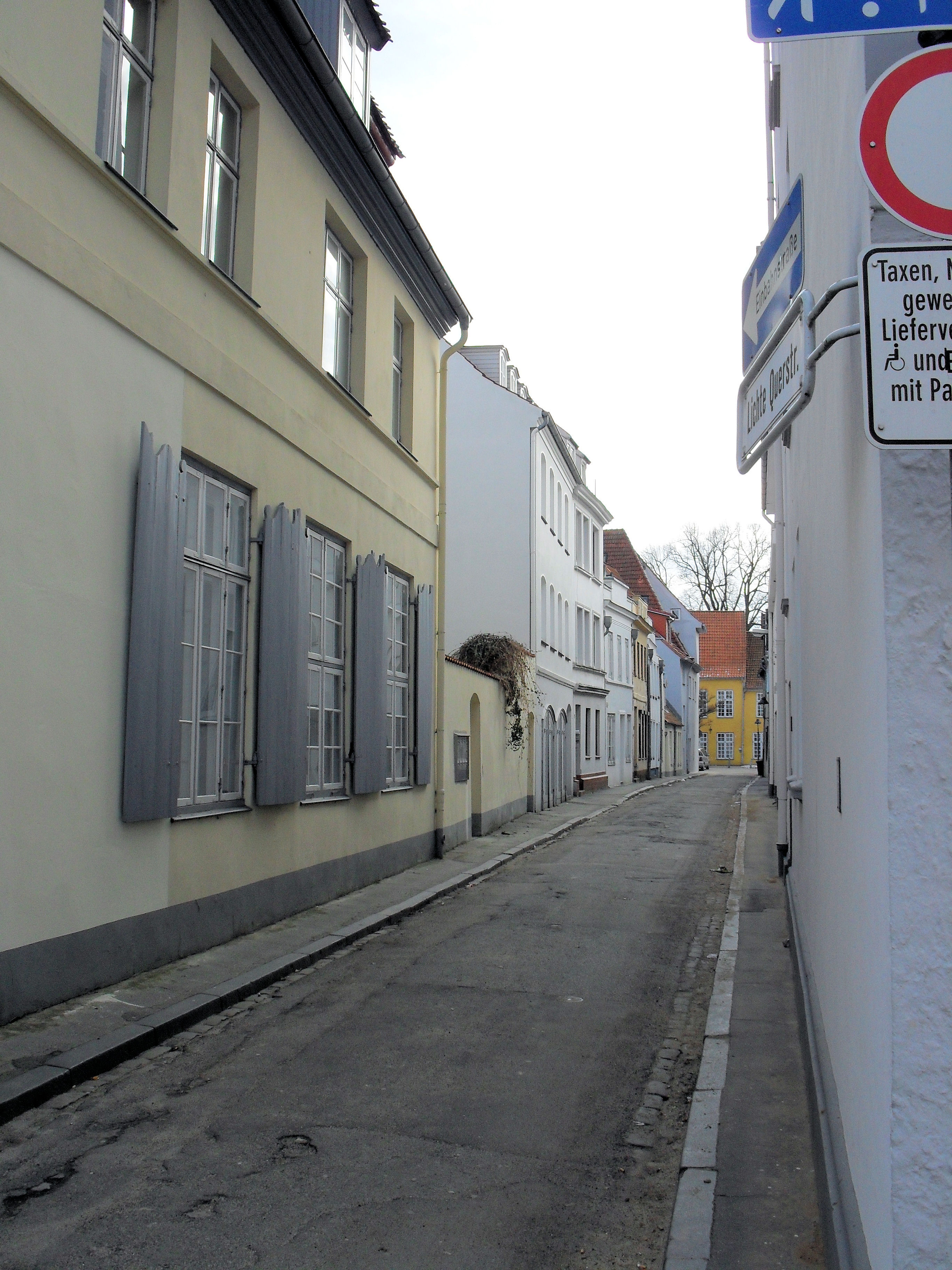 Die Lichte Querstraße in Lübeck